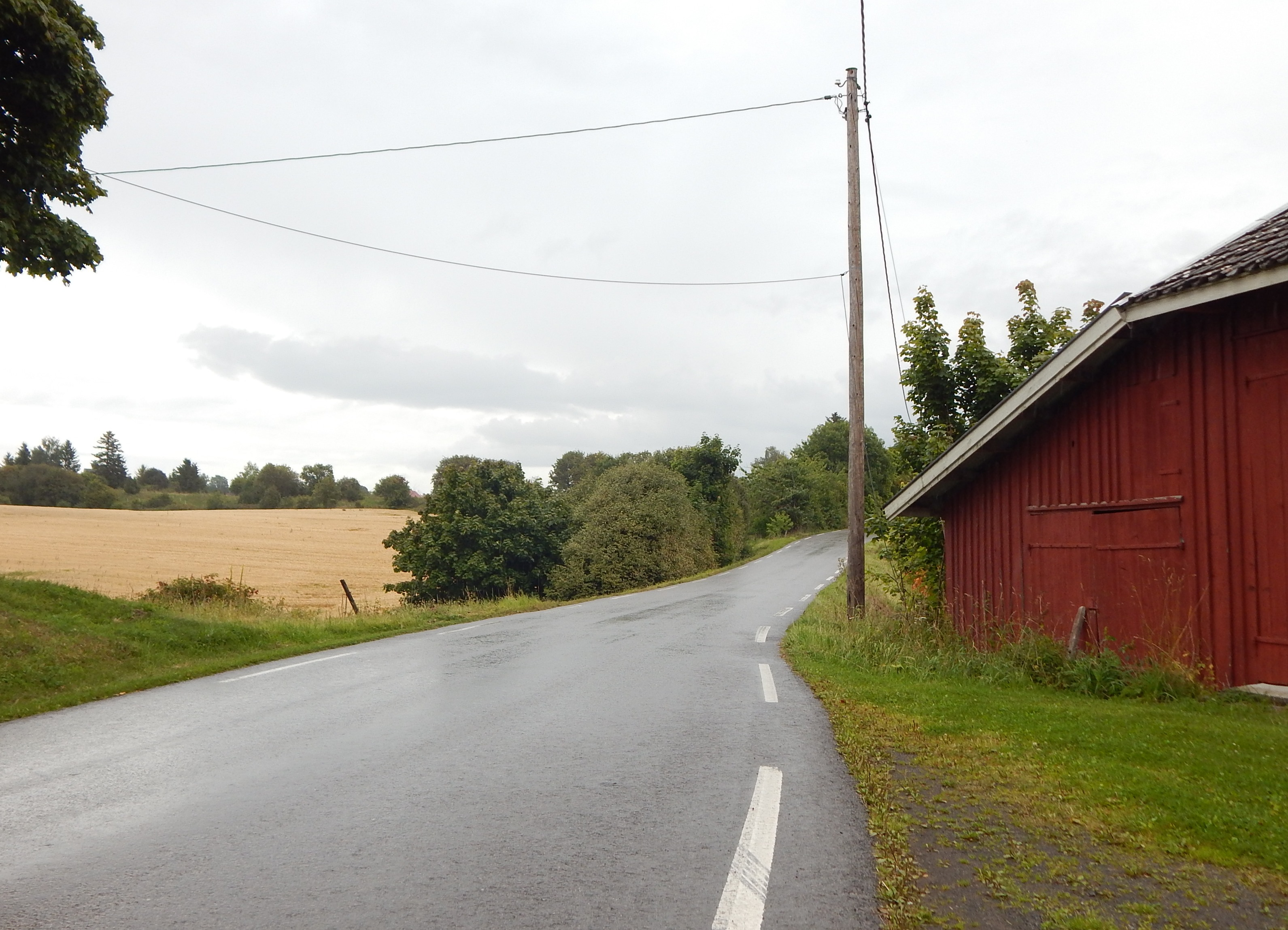 Røysumlinna (fylkesvei 2310, tidl. FV38) nær vestenden